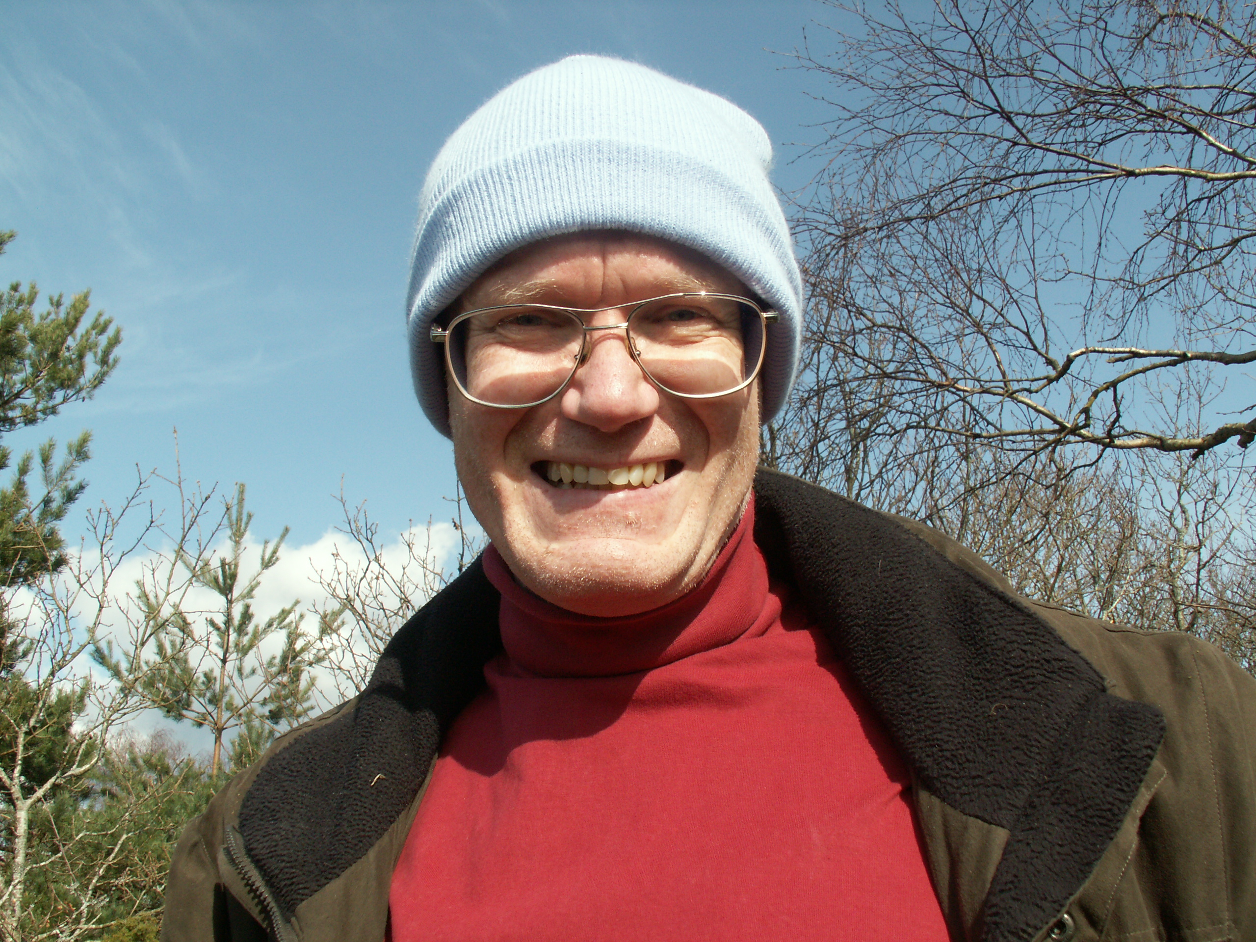 Per A.J. Andersson, i vårsolen uppe på "Hällesås flåg".